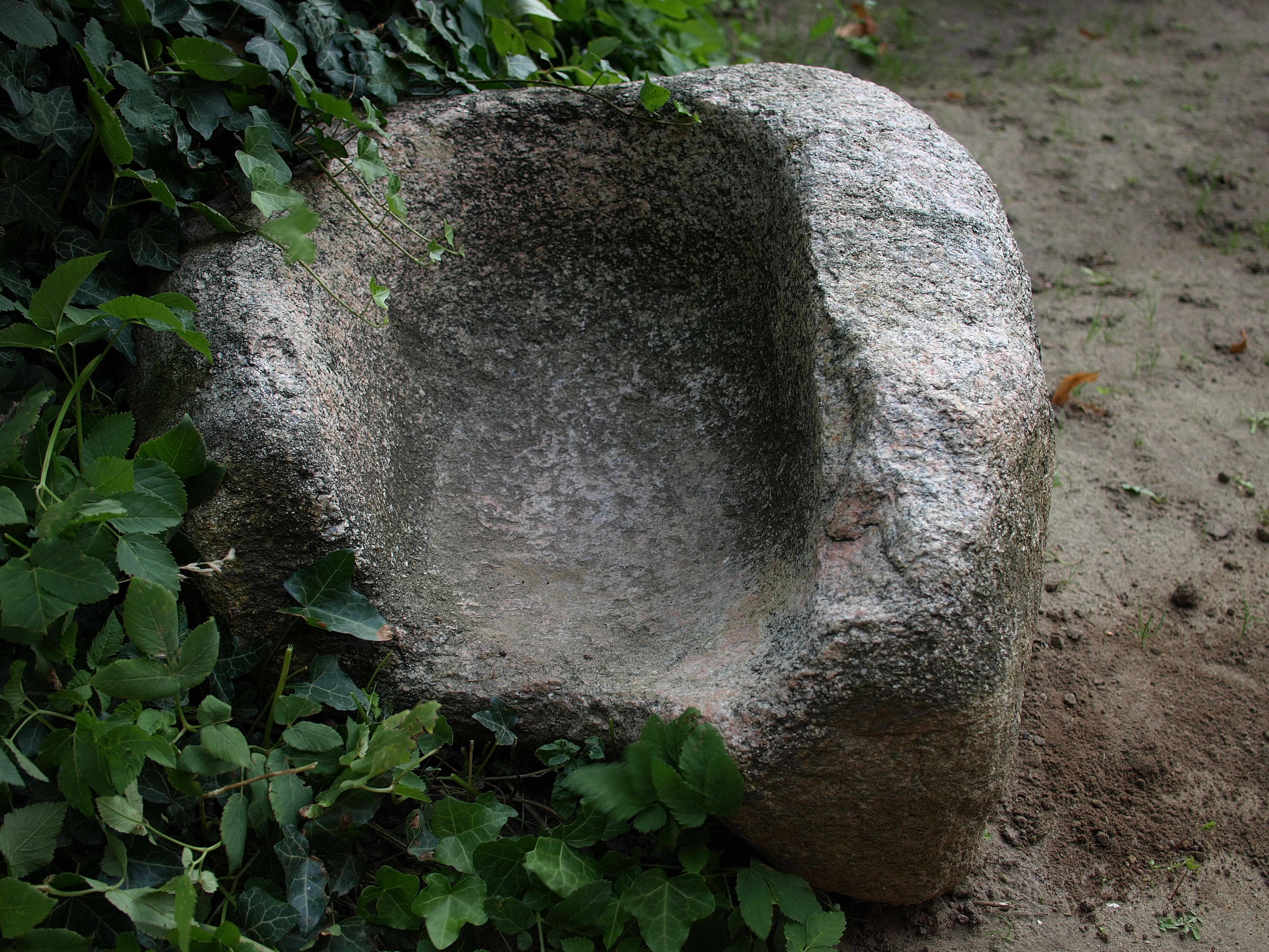 Quern from the Bronze Age at the churchyard of Morgenitz/ Usedom, Germany Bronzezeitlicher Mahlstein neben der Dorfkirche von Morgenitz/ Gemeinde Mellenthin auf Usedom.